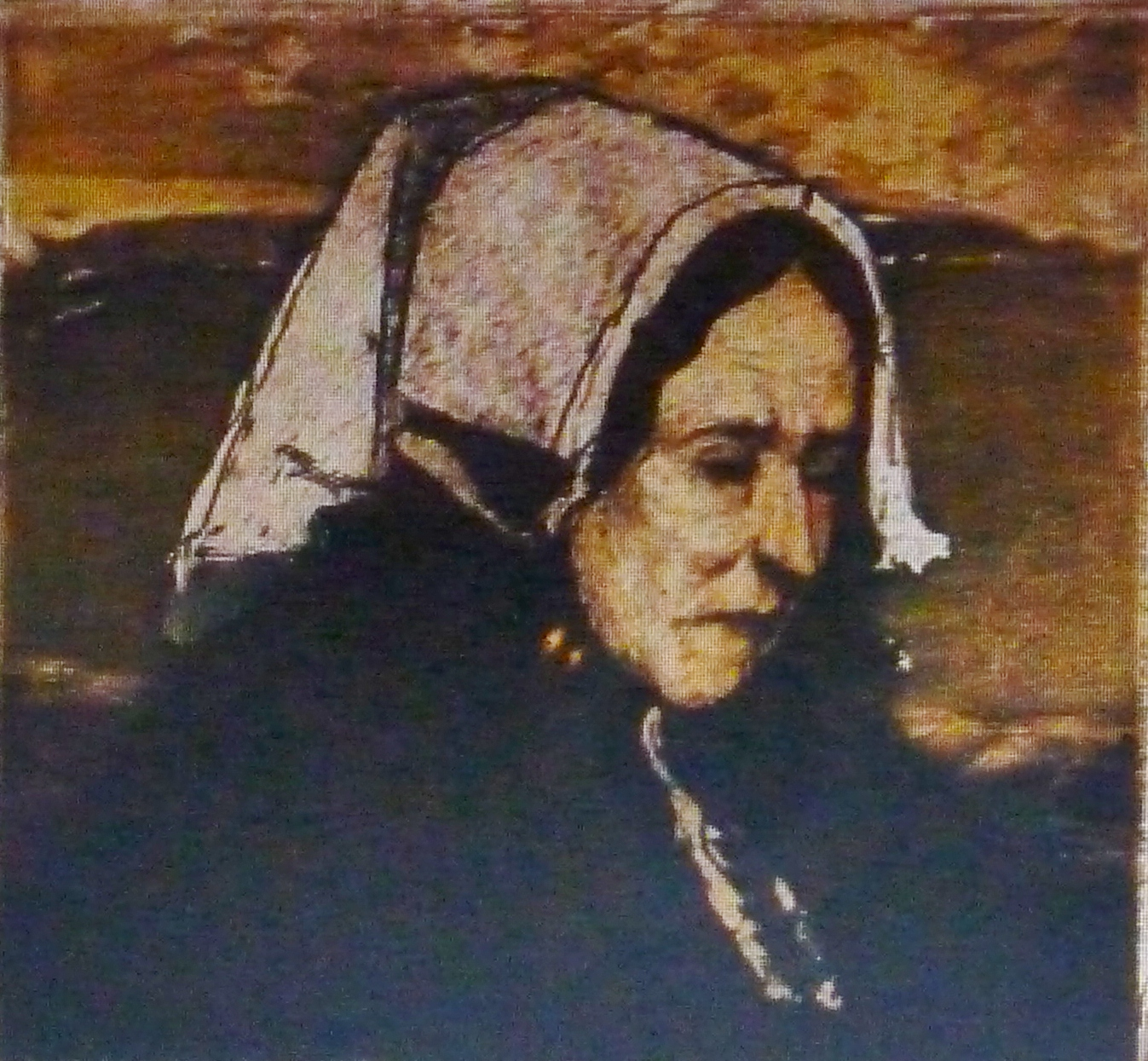 Charles Cottet (1863-1925) : Femme d'Ouessant (estampe, entre 1903 et 1911, Bibliothèque de l'Institut National d'Histoire de l'Art, collections Jacques Doucet)